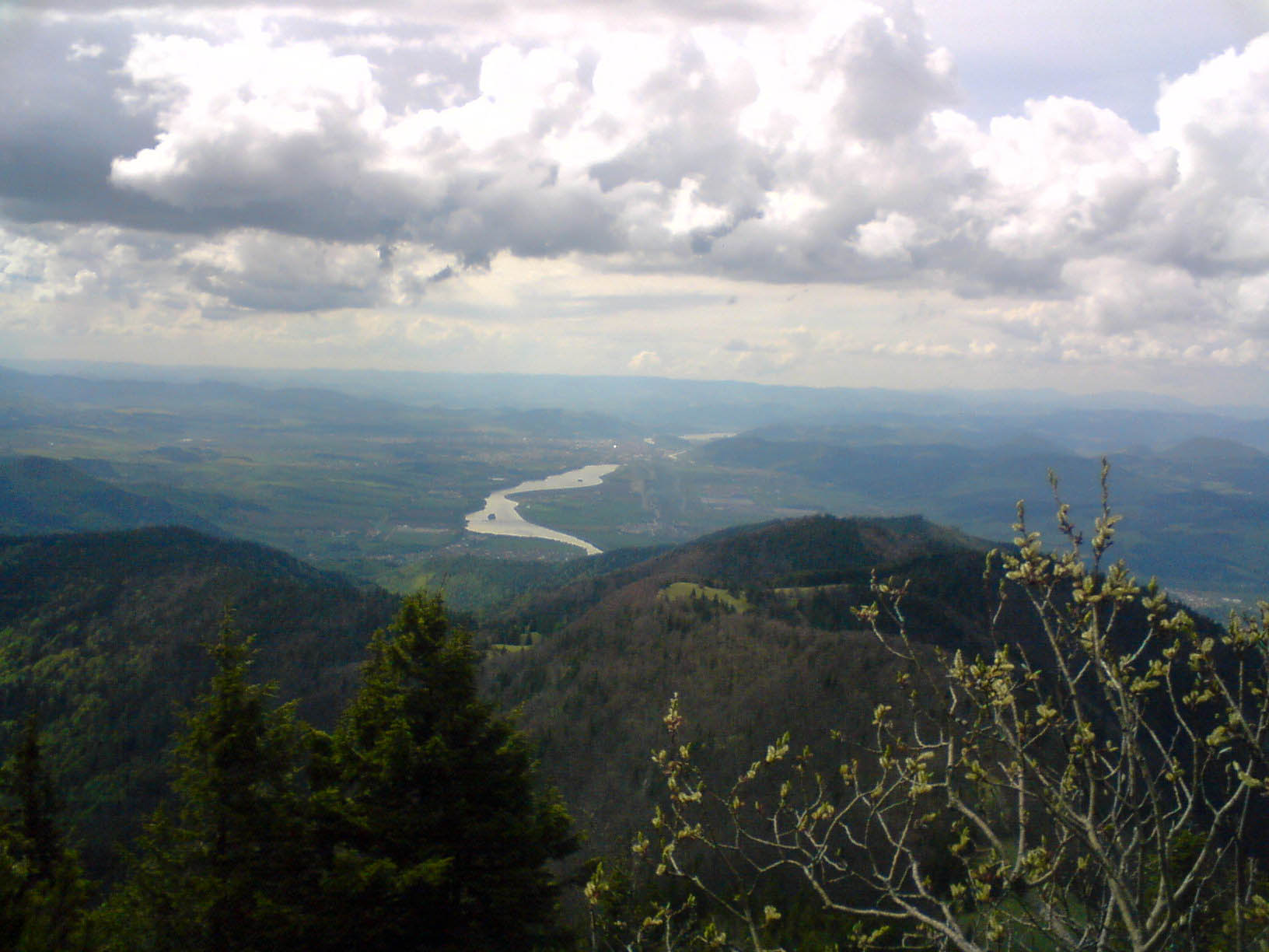 Pohľad na vodné dielo Žilina z vrchu Suchý (1468 m n. m.)